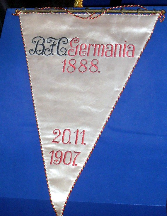 Wimpel des BFC Germania 1888 aus dem Jahr 1907.